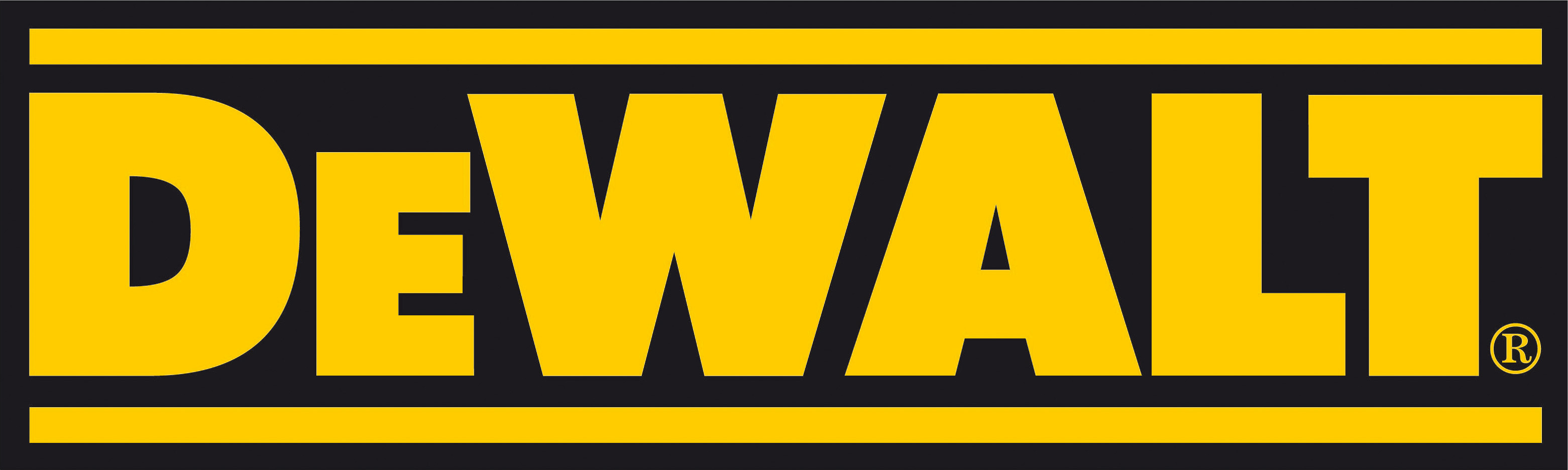 De Walt